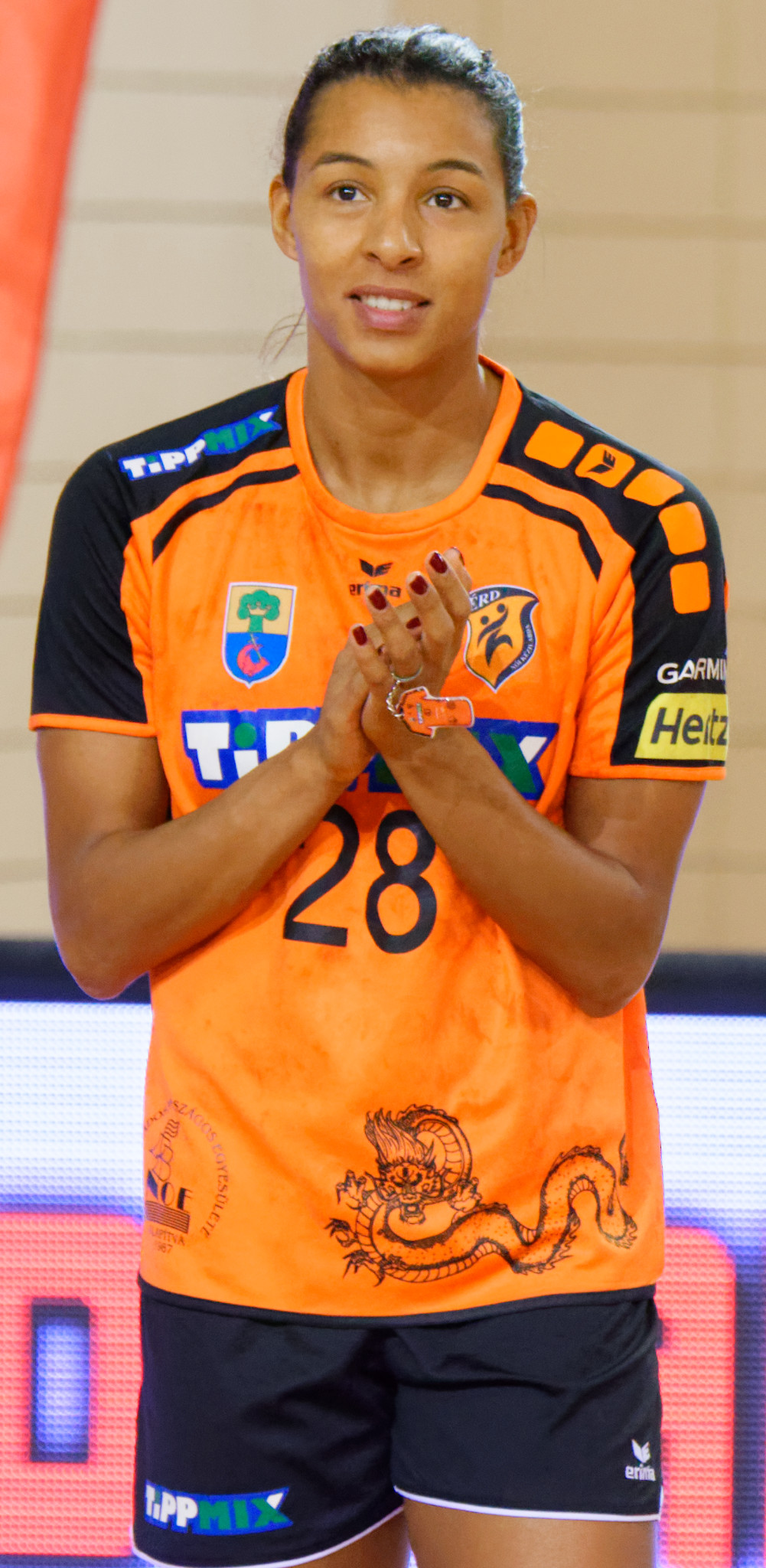 Rencontre retour du 3e tour de la coupe EHF, Issy Paris Hand / Erd. A Issy Les Moulineaux, le 18 novembre 2017.